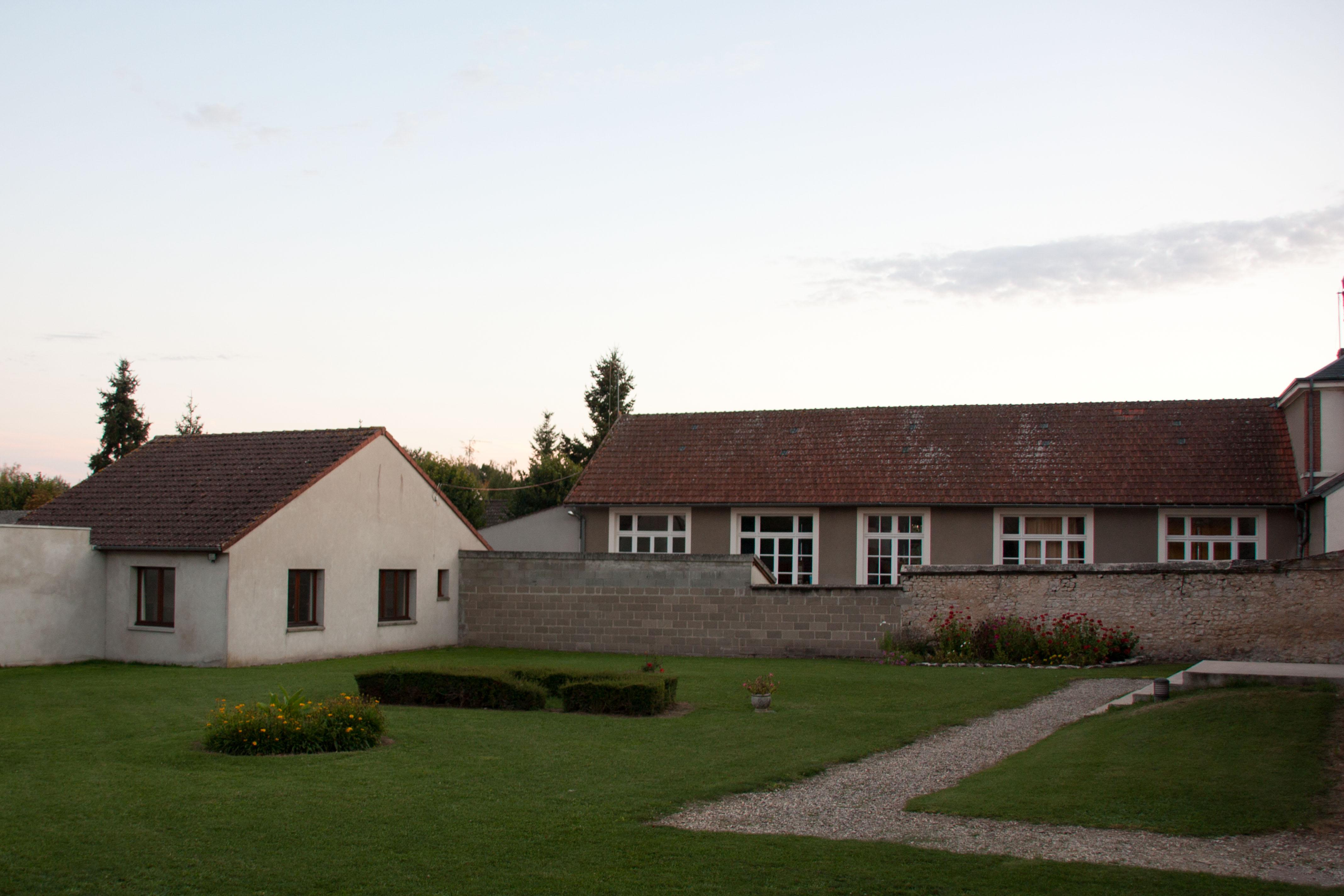 Ecole de Pressigny-les-Pins, Pressigny-les-Pins, Loiret, France